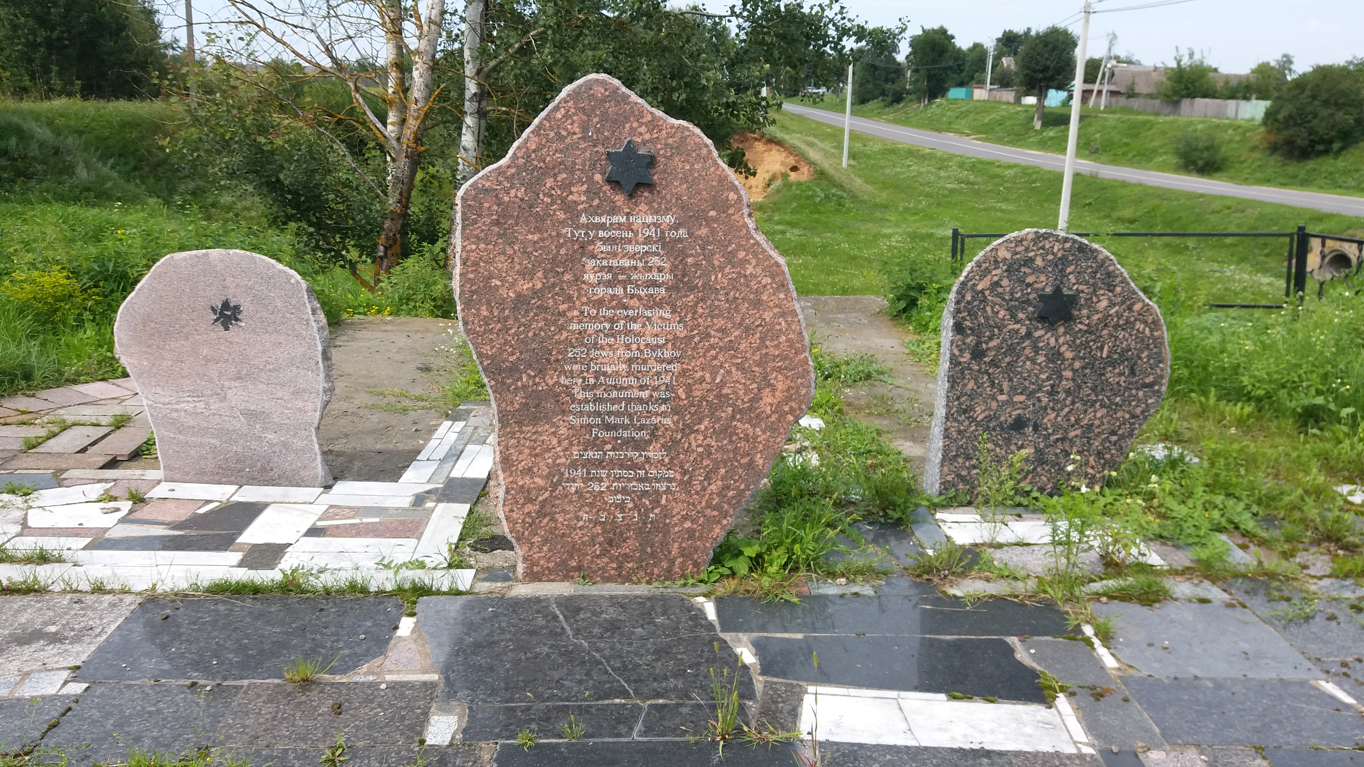 Памятник в урочище Гоньков ров.- на одном из мест убийства нацистами и захоронения евреев города Быхов Могилевской области Беларуси. Три камня символизируют убитых женщин, мужчин и детей. Бетонные плиты длиной по 7 метров, нависающие надо рвом, символизируют последний путь евреев, которых подводили в этом месте к краю ямы и убивали. Камни на дне ямы символизируют убитых и сброшенных туда людей. На это место были также перезахоронены и евреи, убитые примерно в 200-х метрах отсюда (на месте их расстрела также установлен памятник в виде камня). Проект мемориала был разработан и осуществлен Леонидом Левиным.